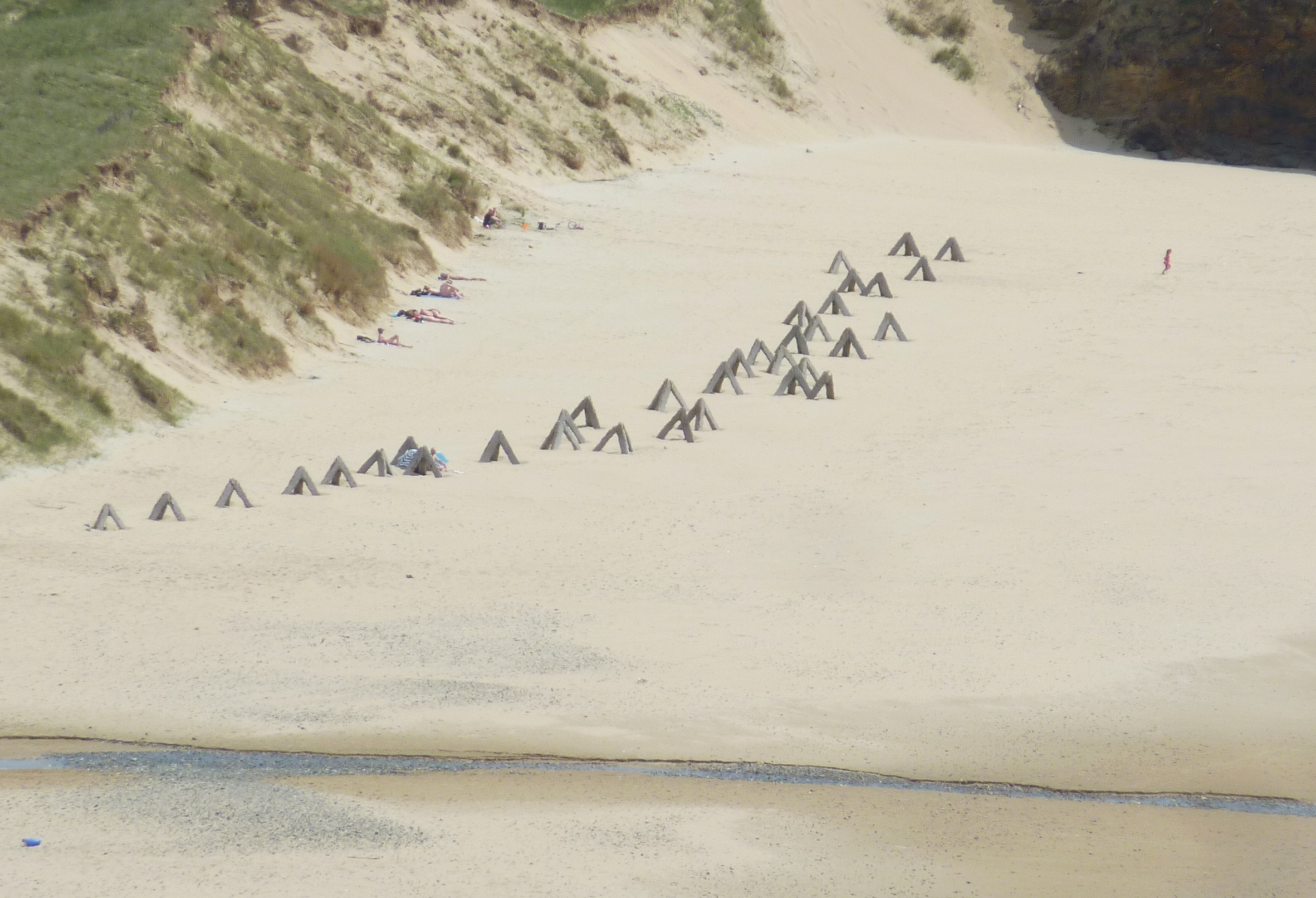 Chevaux de frise disposés par les Allemands pendant la Seconde Guerre mondiale sur la plage de Lostmarc'h